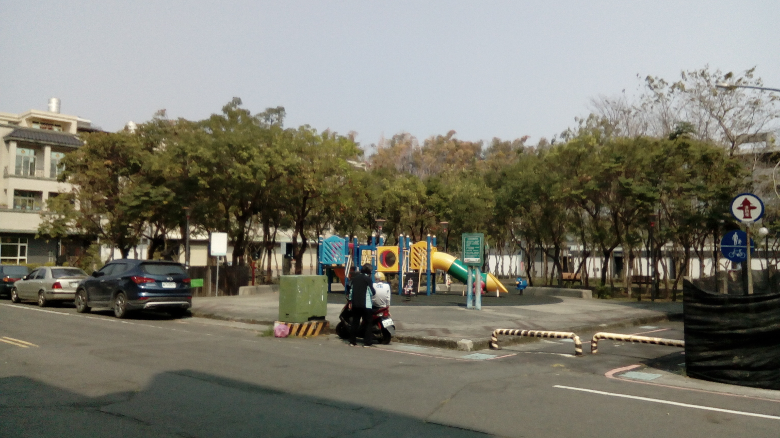 同上 位於鳥松區仁美的一處社區公園